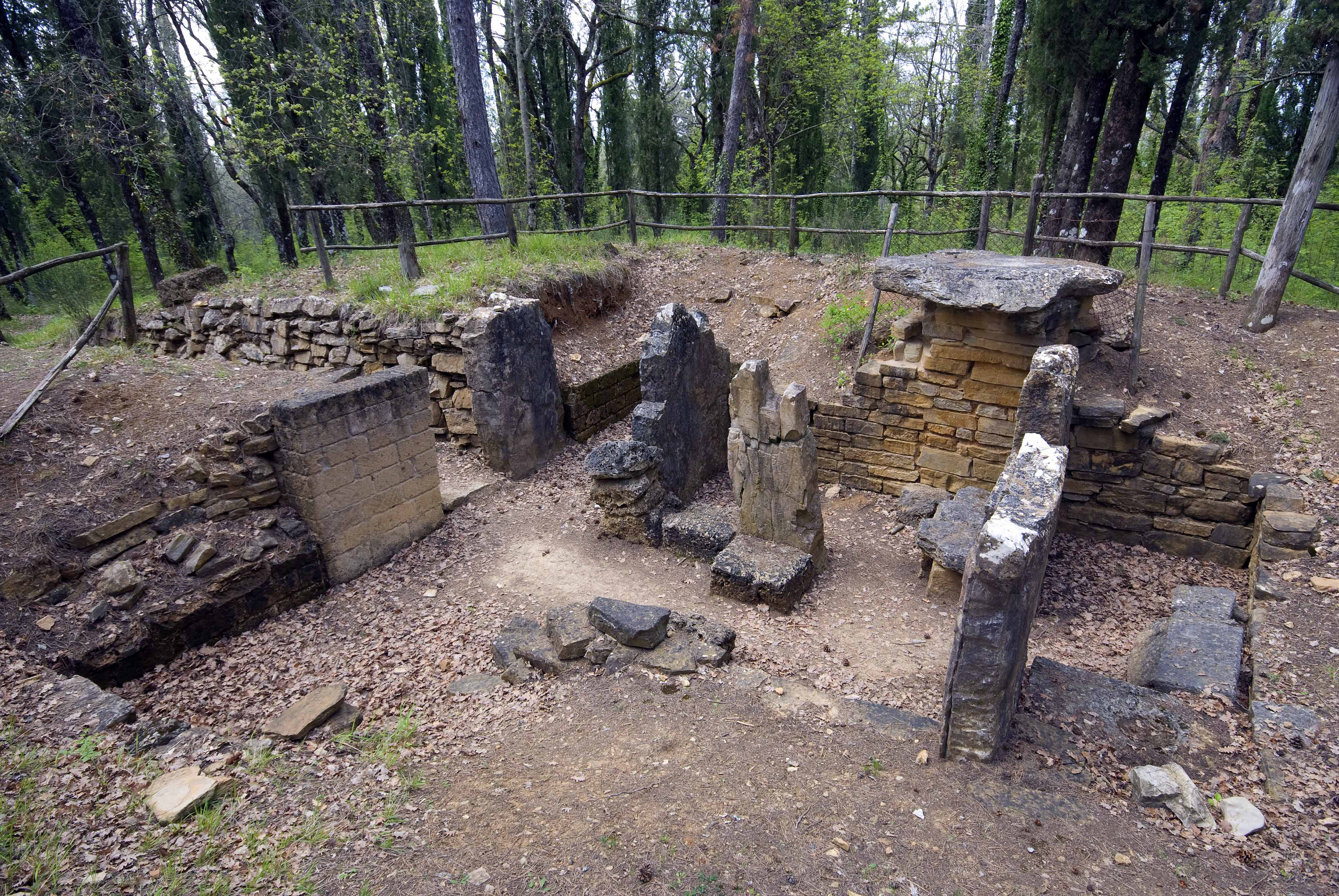 Necropoli etrusca del Poggino tomba 3